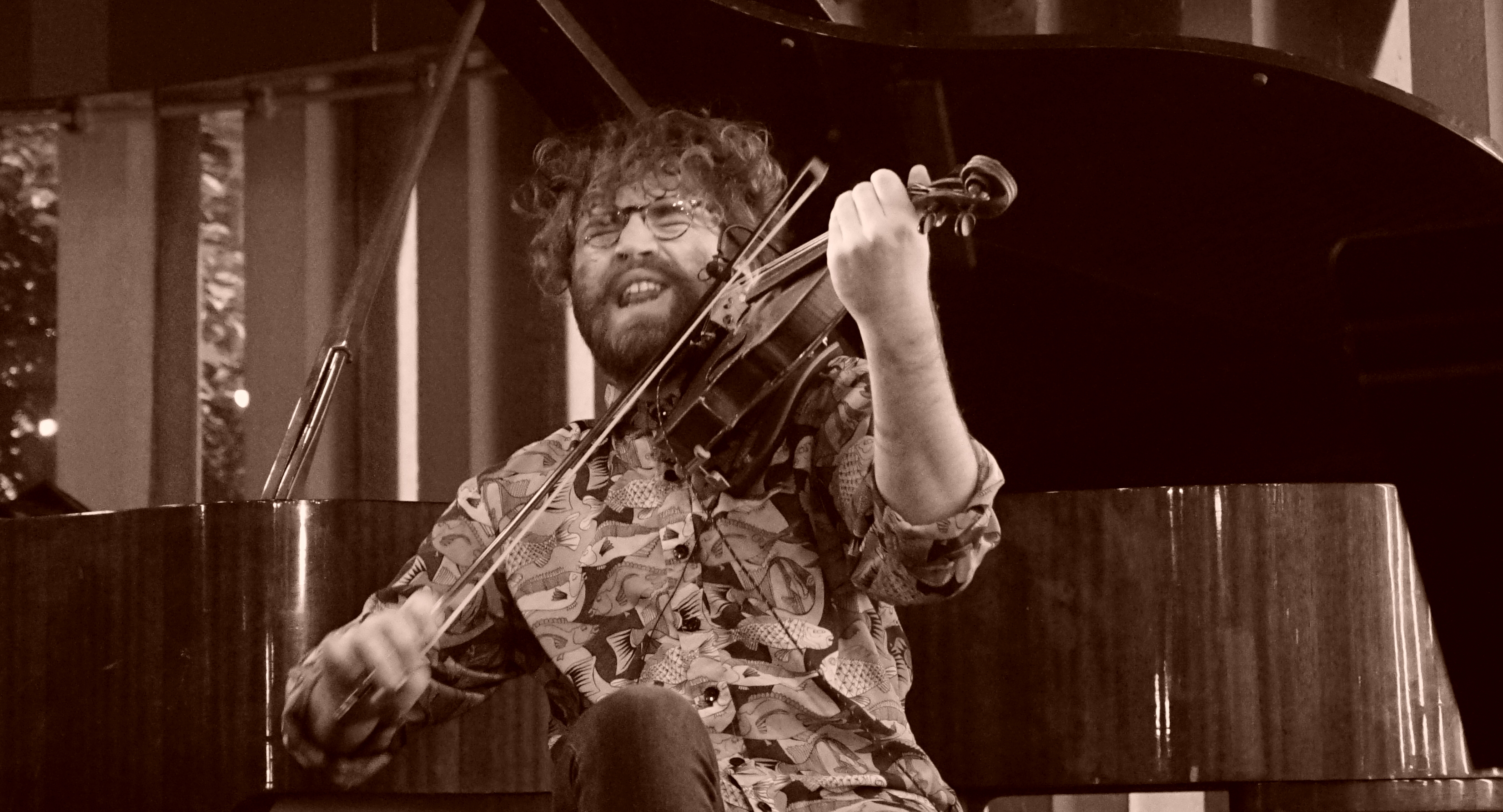 lors du concert à la COmédie de reims.